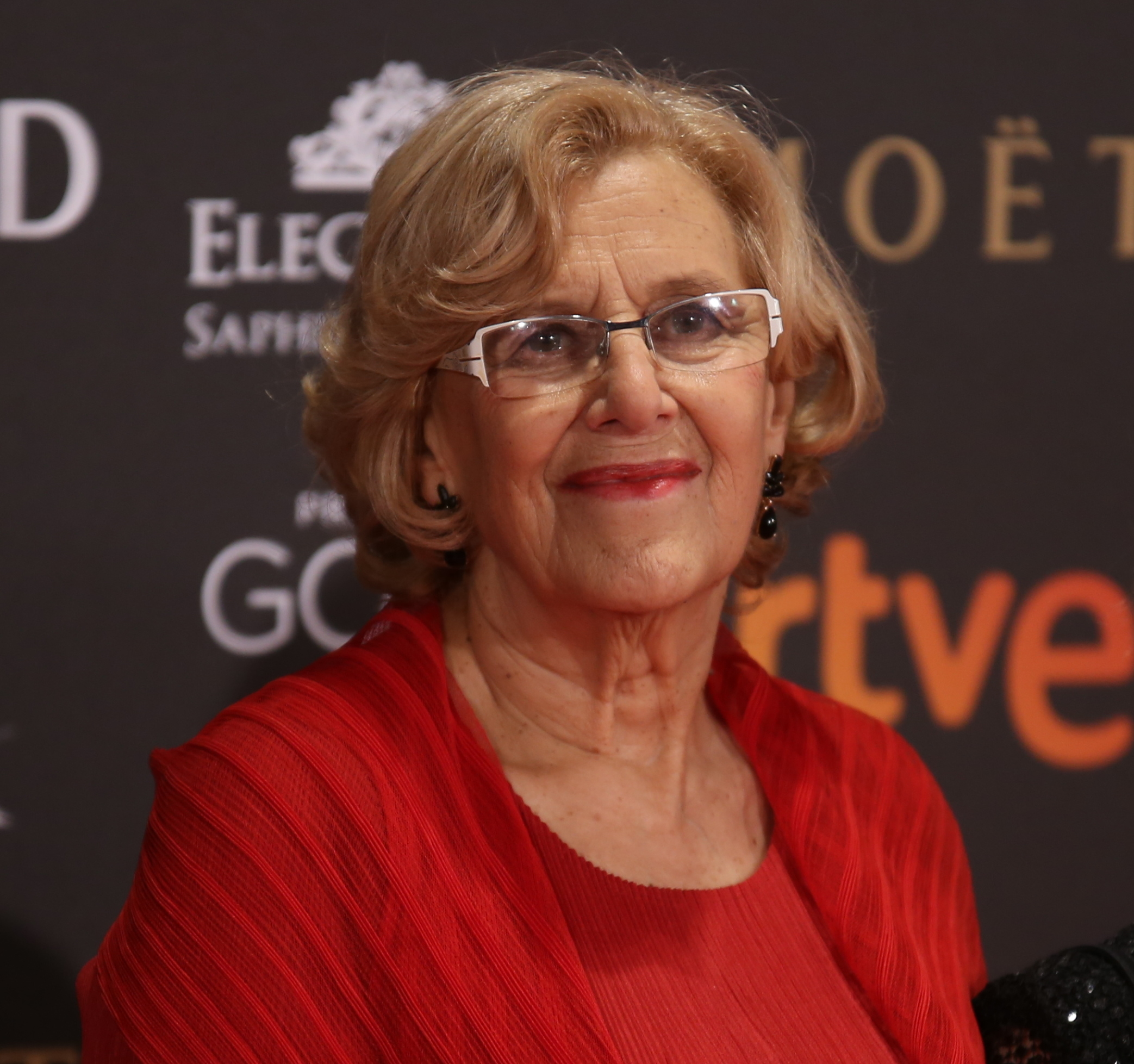 Premios Goya 2017